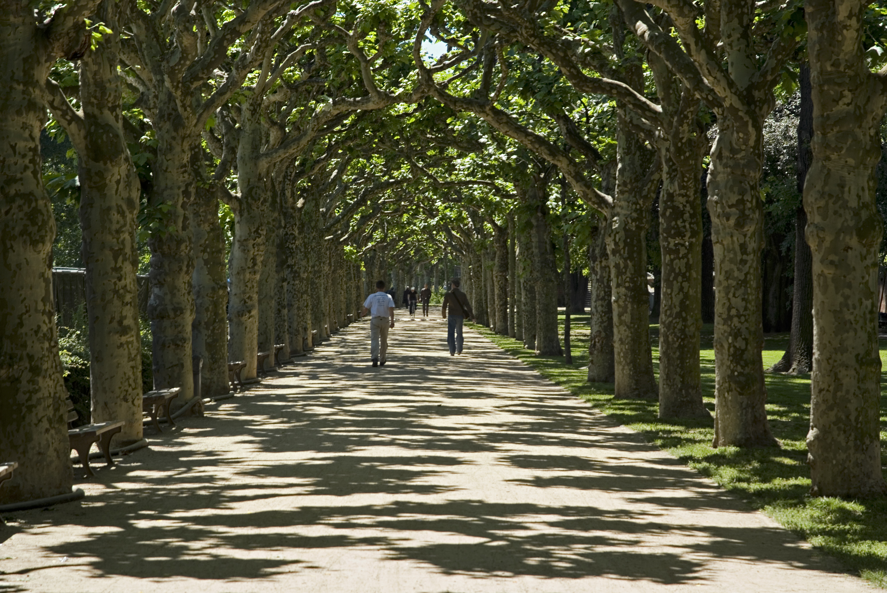 Platanenallee am Nizza